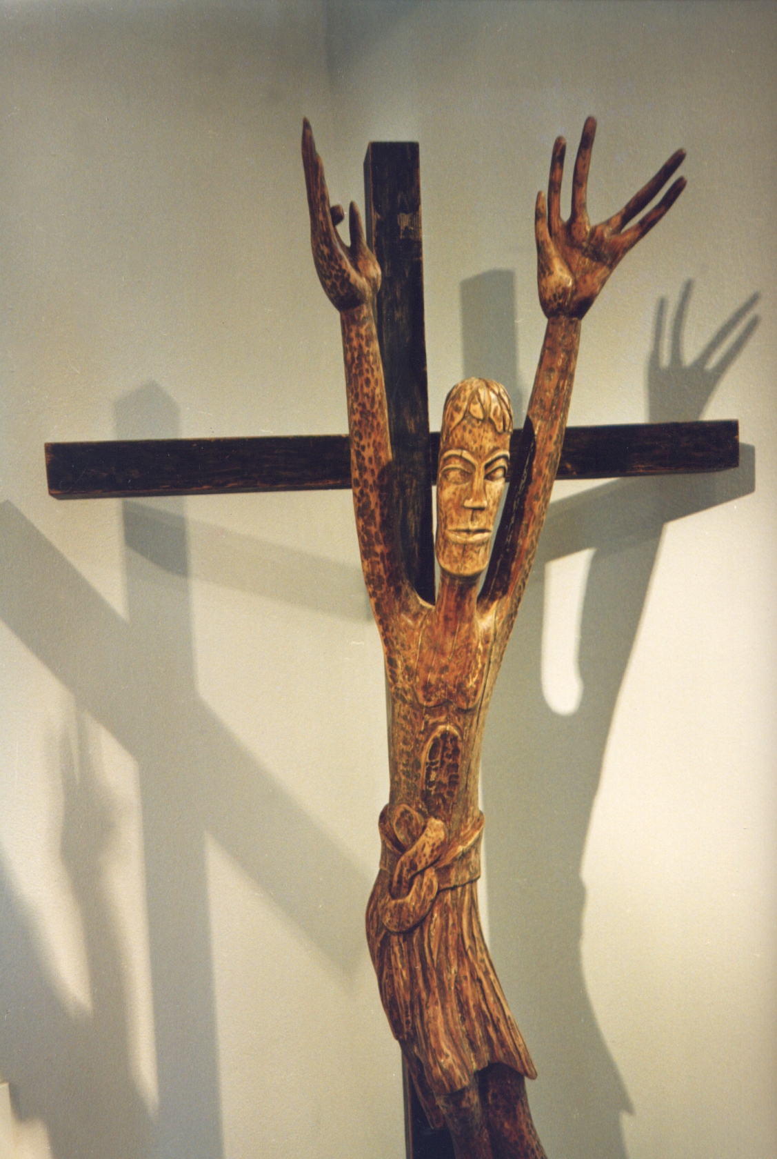 Auferstehung